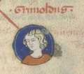 représentation de Grimoald II, fils de Pépin de Herstal et de Plectrude